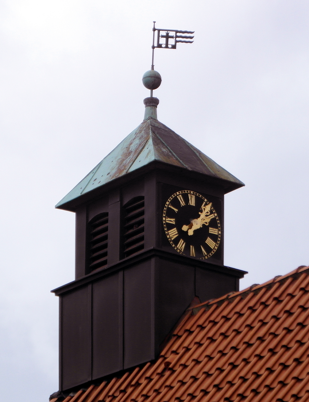 Dachreiter der Lemmier Kapelle. Die Uhr wurde 2003 durch eine Funkuhr ersetzt. Davor war sie für ihren Gangfehler von täglich mehreren Stunden in der Lokalpresse bekannt geworden.